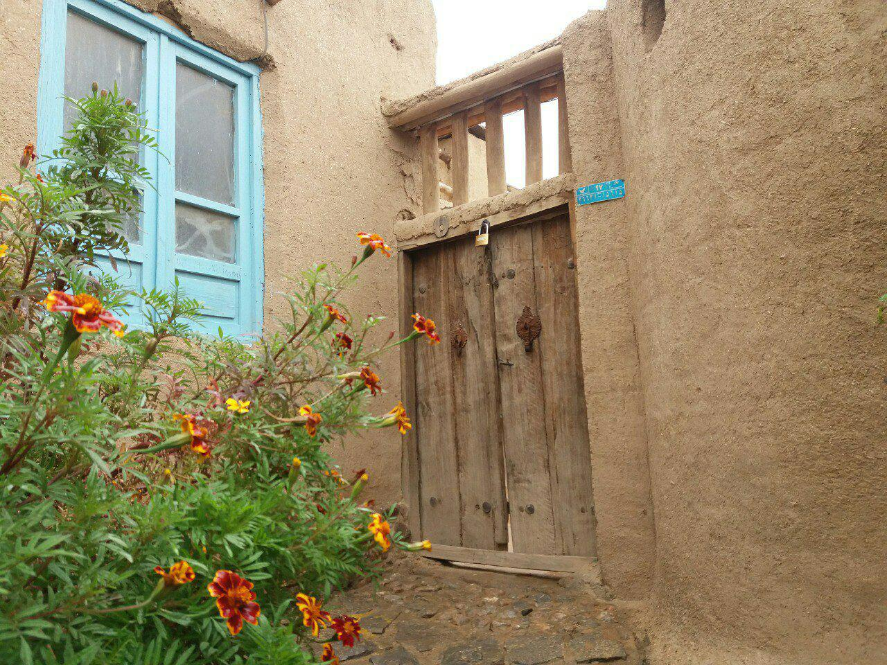 قلعه بالای یک روستای پلکانی در کویر است